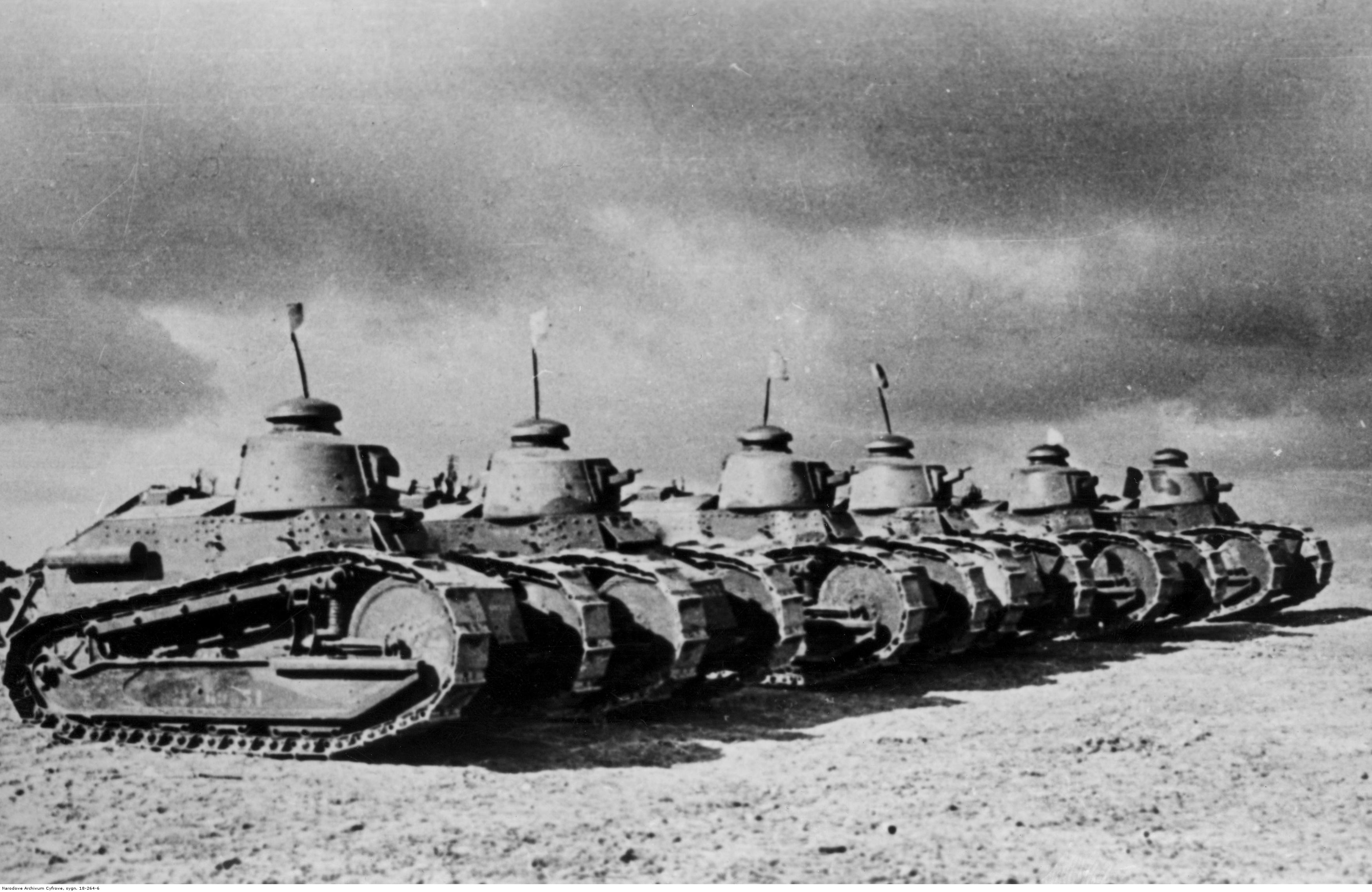 1 Pułk Czołgów Wojska Polskiego we Francji - czołgi Renault podczas postoju; 1940 r. Archiwum Fotograficzne Czesława Datki. Sygnatura: 18-264-6